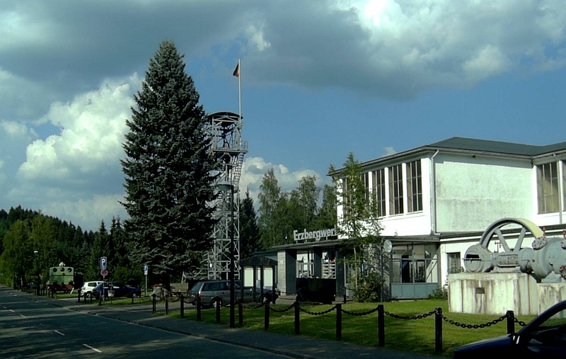 Erzbergwerk Ramsbeck, Germany.